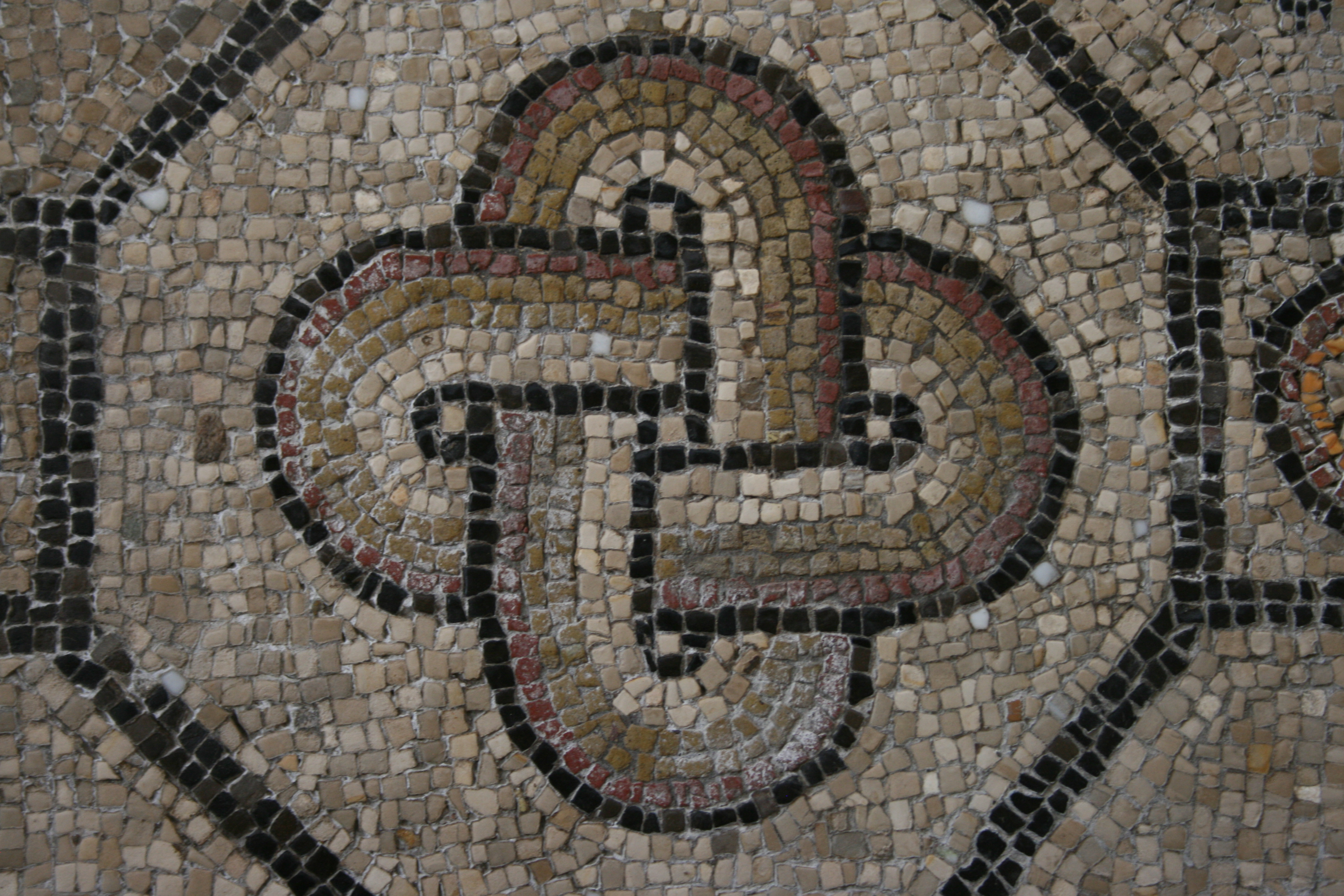 Mosaik in der Basilika von Aquileia